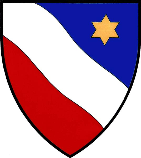 Znak obce Labská Stráň